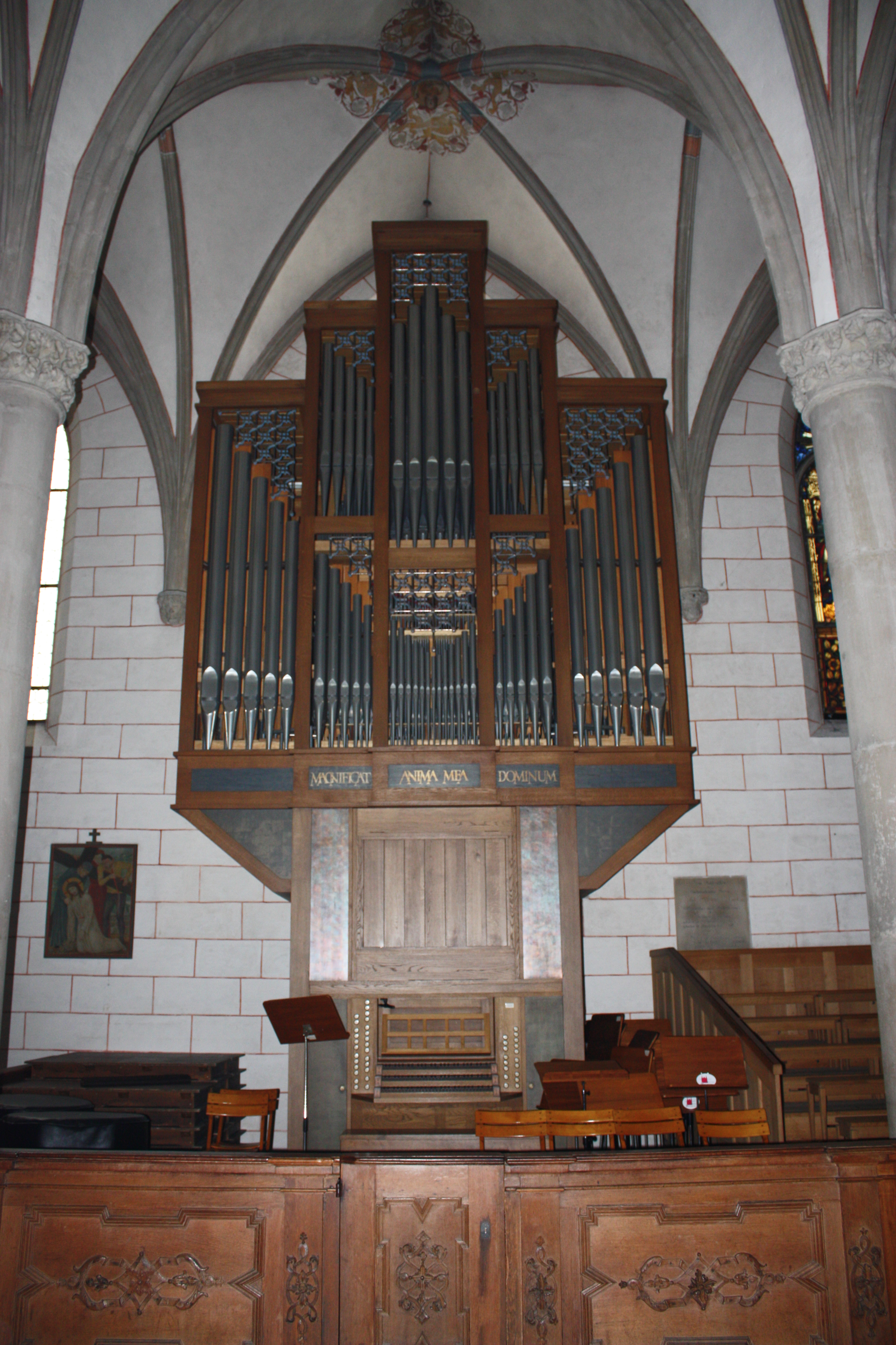 Dom Unserer Lieben Frau, Augsburg: „Magnifikat-Orgel“ von Rudolf Kubak (1988; III/P, 42)